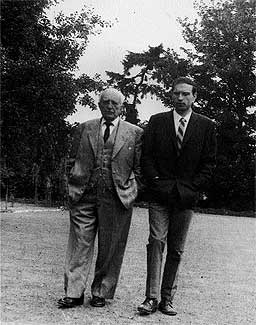 Salvador de Madariaga y José Antonio Jáuregui, paseando por Oxford en 1972 (Fotografía del álbum familiar, cedida por Jesús María Jáuregui)